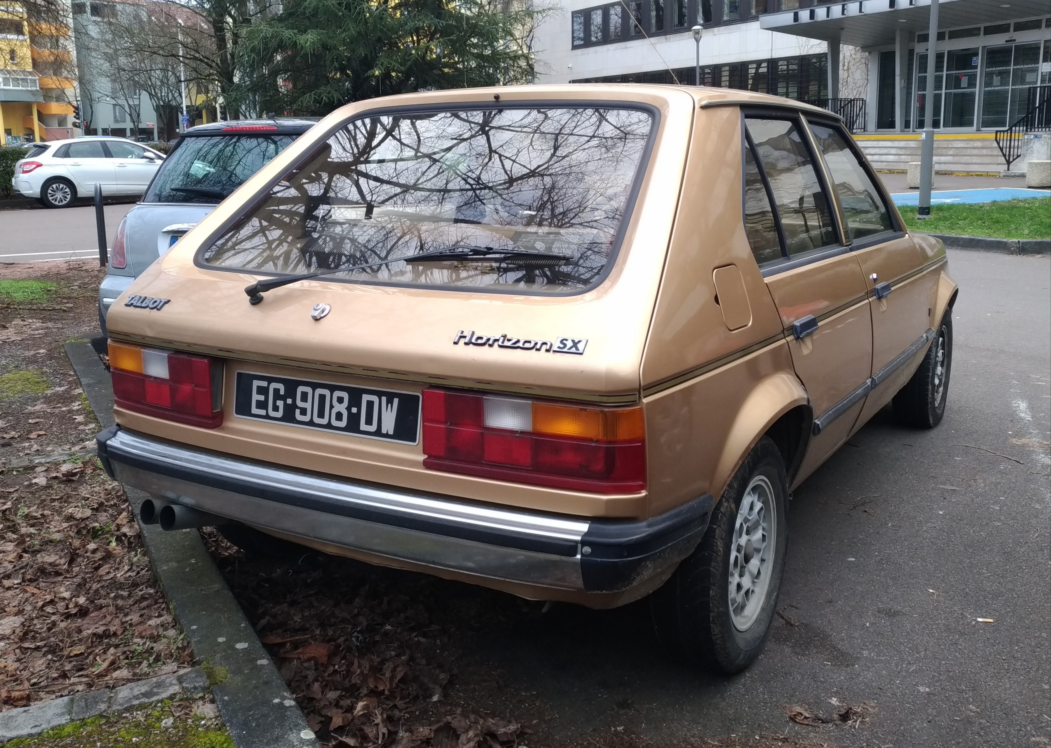 1982 Talbot Horizon (1.4 65hp) at Dijon